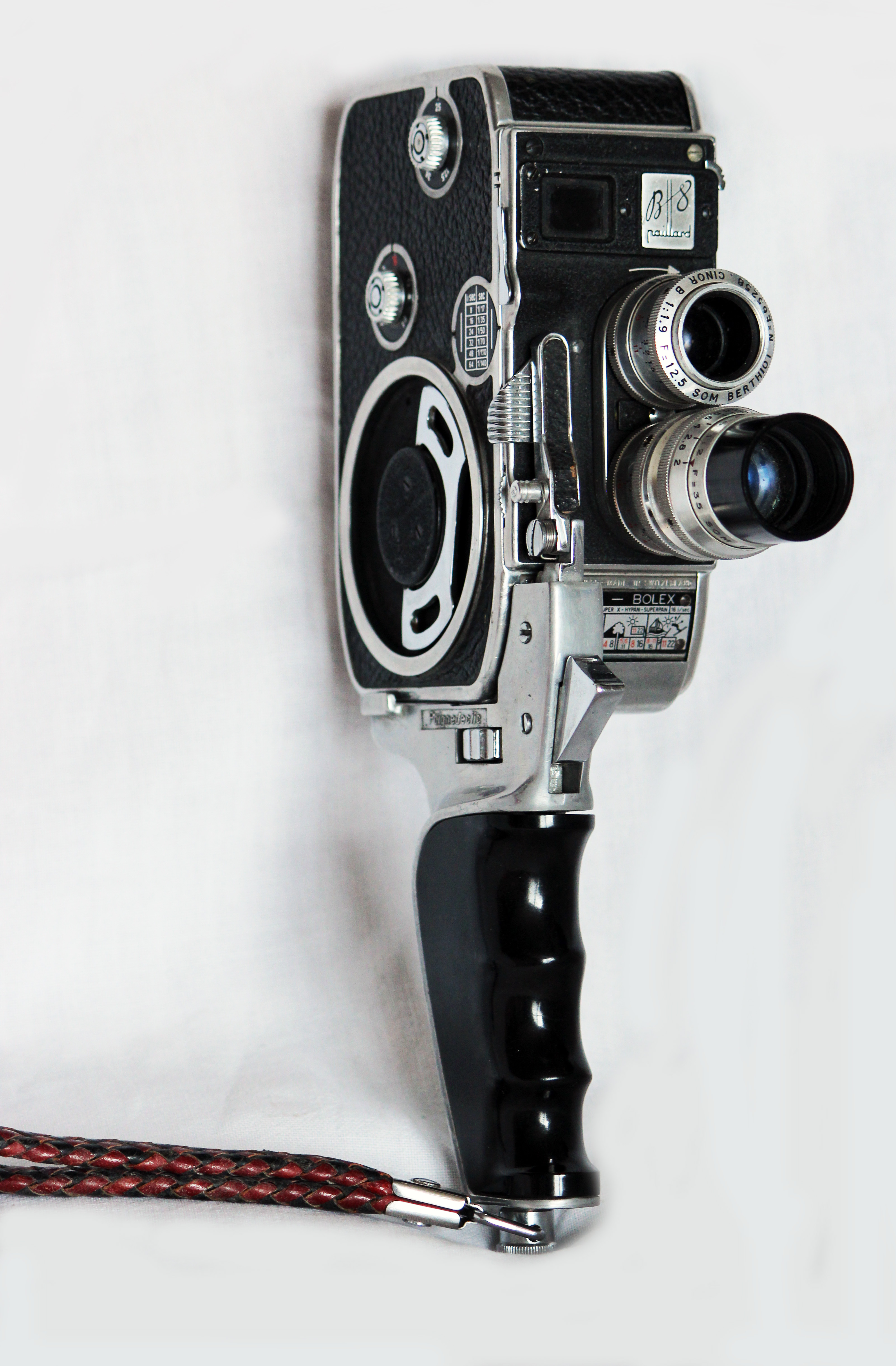 Caméra cinéma amateur utilisant les films au format Double 8 mm, de la marque suisse PAILLARD, vendue de 1945 à la fin des années 1960, munie de deux objectifs Som Berthiot, de focales 12,5 mm et 35 mm et d'une poignée de déclenchement du moteur, terminée par une dragonne de sécurité à passer au poignet. Le moteur est un mécanisme d'horlogerie à ressort que l'on retend à l'aide de la clé visible sur le flanc de l'appareil. La vitesse est variable, de 8 images par seconde à 64 images, et permet l'image par image (dessin animé, pixilation). Vendue dans le monde entier à plusieurs centaines de milliers d'exemplaires.